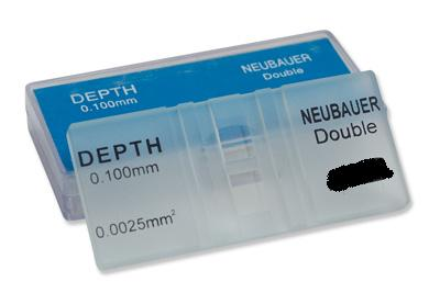 Cámara Neubauer doble